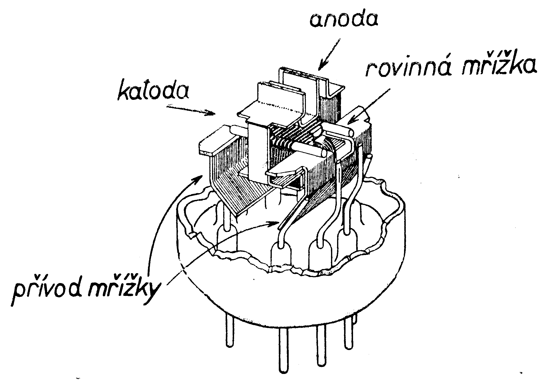 6AM4 inner structure